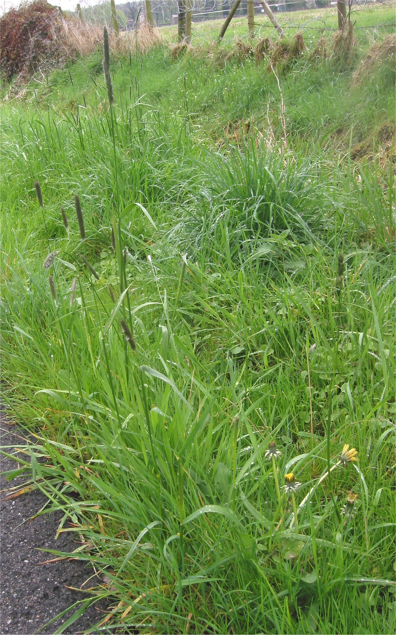 Alopecurus pratensis on road side (Grote vossenstaart in slootberm langs fietspad)